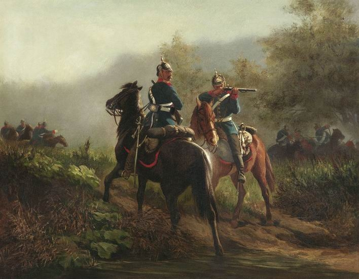 Manöver: Preußische Soldaten im Gefecht. rechts: C. Suhrlandt. Öl auf Leinwand. Doubliert. 64,5 x 84cm.